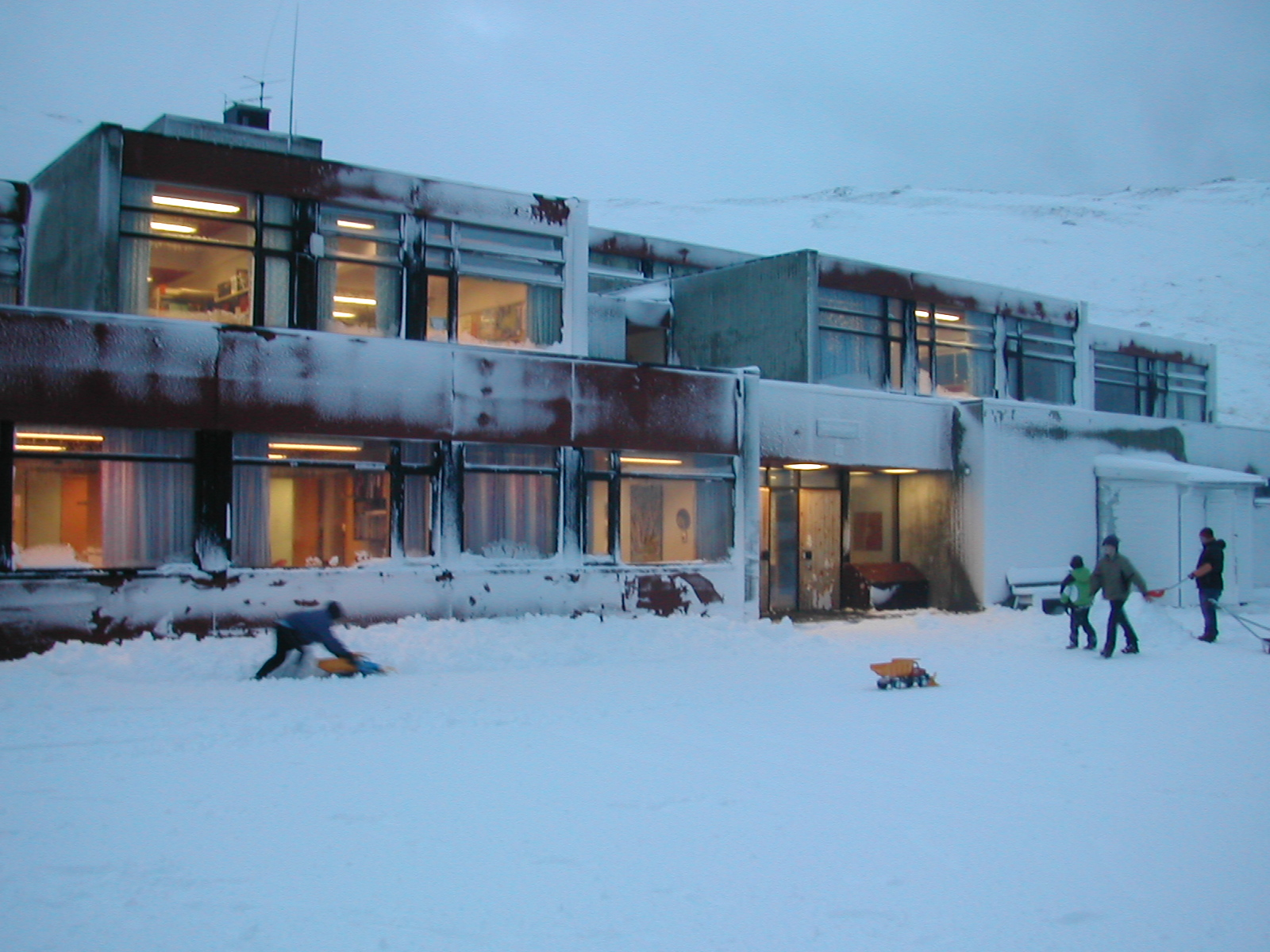 Skarsvåg skole i Nordkapp kommune